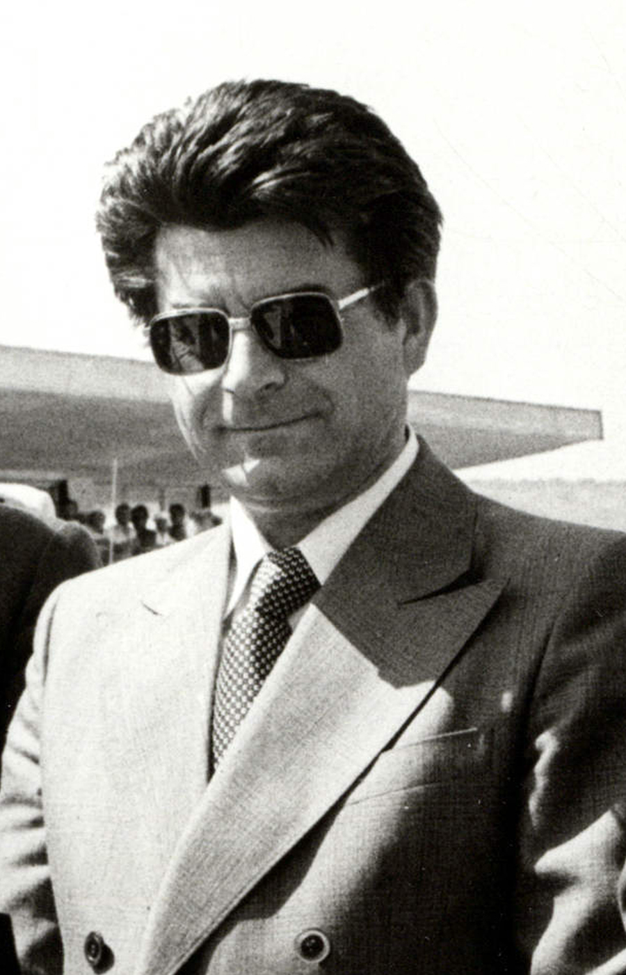 Srpski (latinica): Petar Fleković (rođen 1932), privrednik i društveno-politički radnik SFR Jugoslavije i SR Hrvatske.